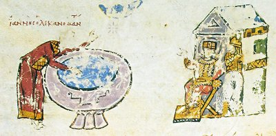 Патриарх К-польский Иоанн VII Грамматик во время гадания на воде в лохани. Миниатюра из Хроники Иоанна Скилицы. XII в. (Matrit. gr. 26. Fol. 2)